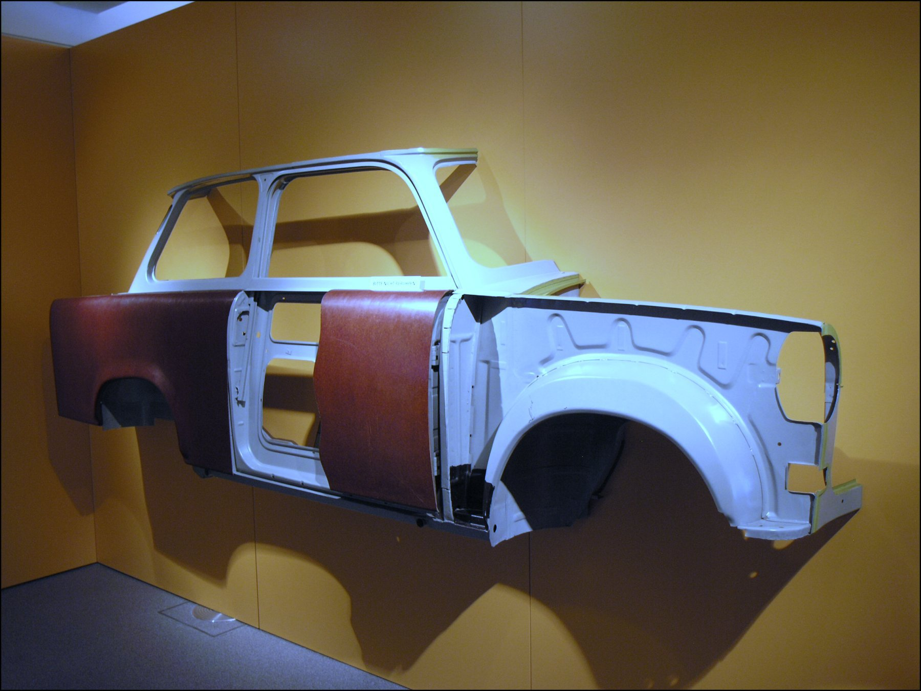 Trabant